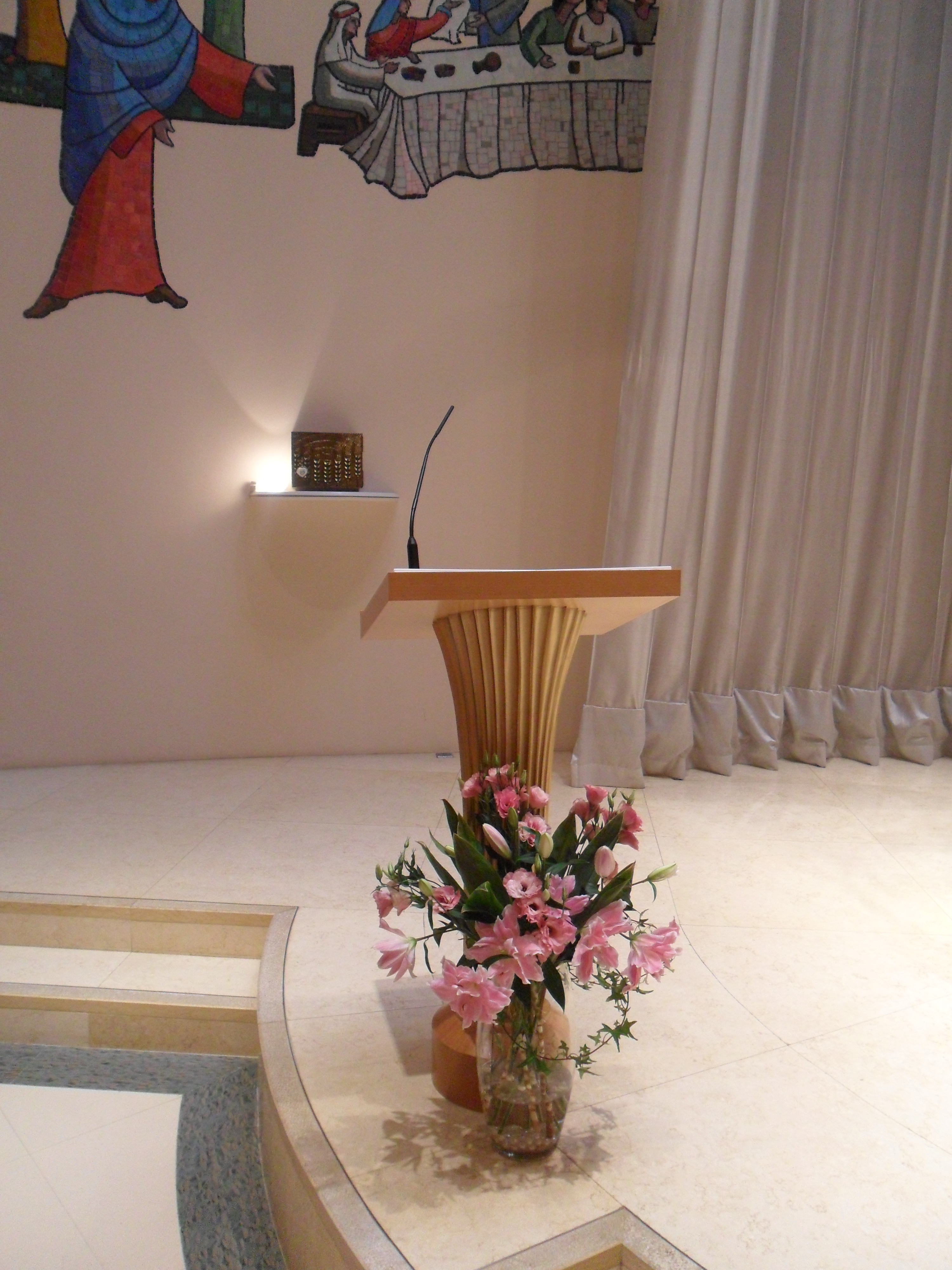 中文（香港）: 聖母聖衣堂, 香港, 中國